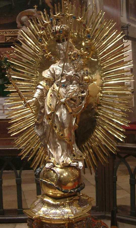 Silber-Tragefigur (Prozession) St. Maria de Victoria hat auf einem Rokoko-Holzsockel Maria mit Kind, Krone und Zepter auf der Weltkugel stehend, die Aureole geschmückt mit zwölf Sternen. Die ganze Figur ist von einem vergoldeten Strahlenkranz umgeben